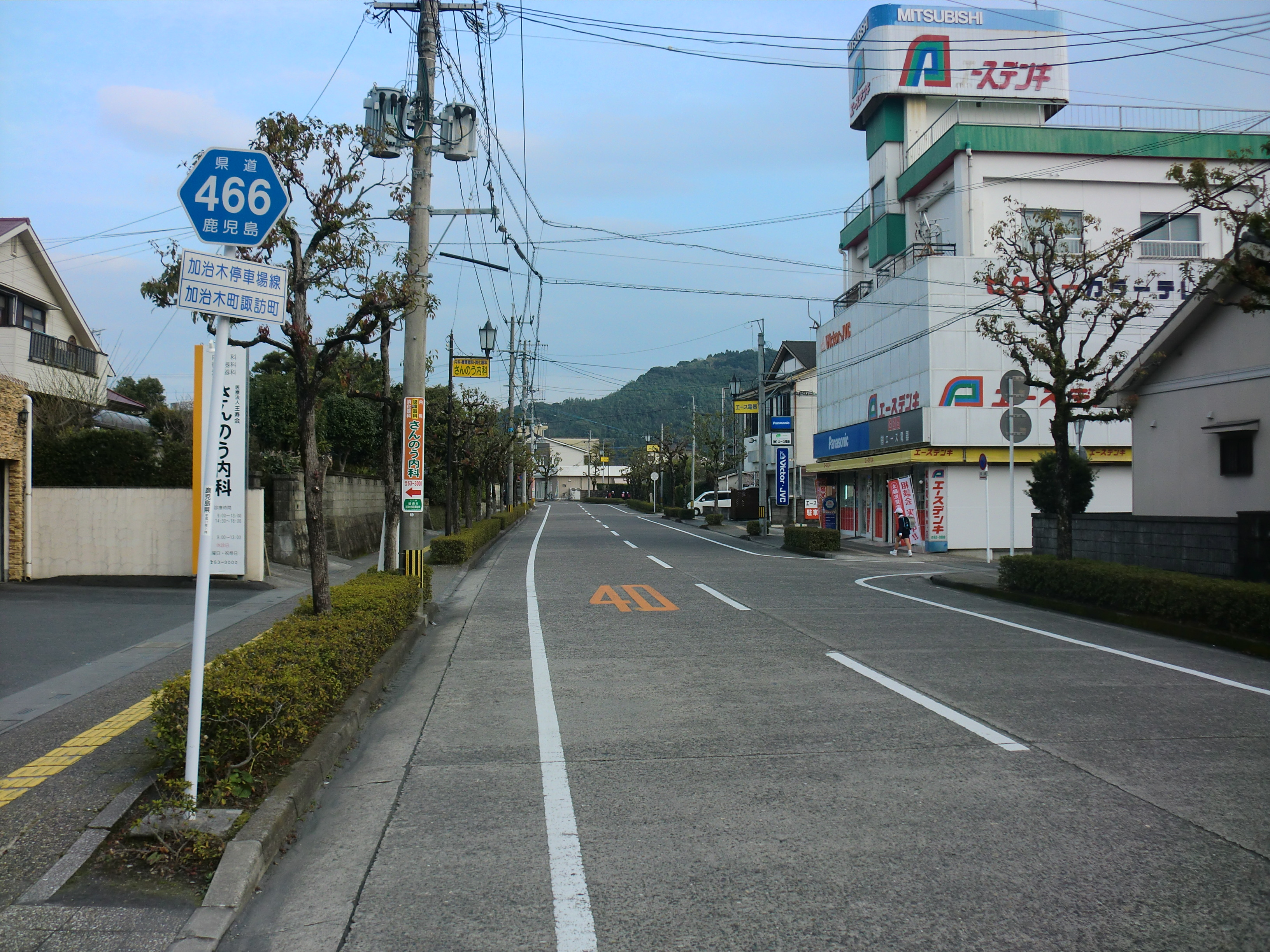 鹿児島県道466号加治木停車場線。姶良市で撮影。